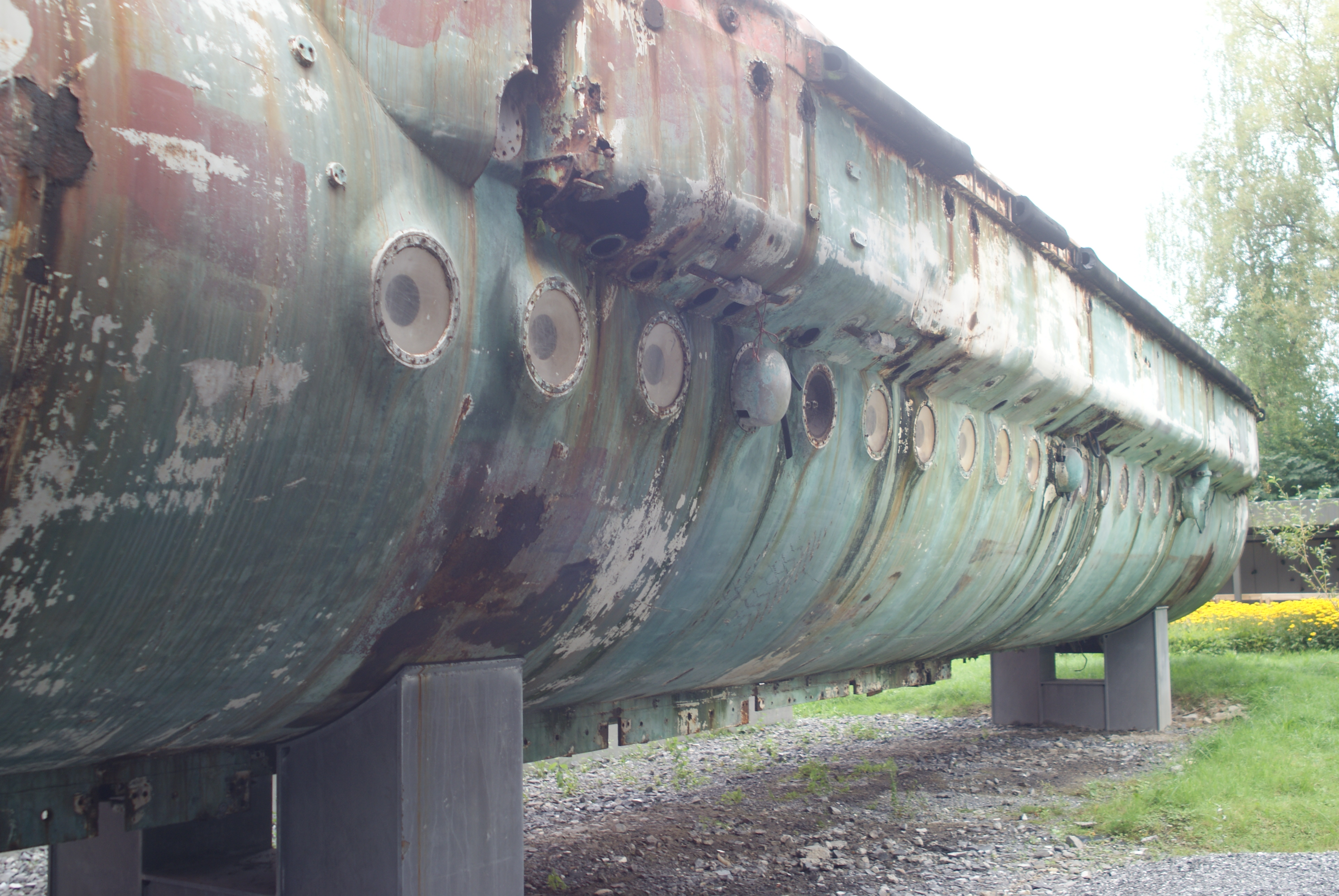 Mésoscaphe im Verkehrshaus der Schweiz, Luzern